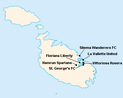 Répartition des clubs en First Division Maltaise 1916-1917.